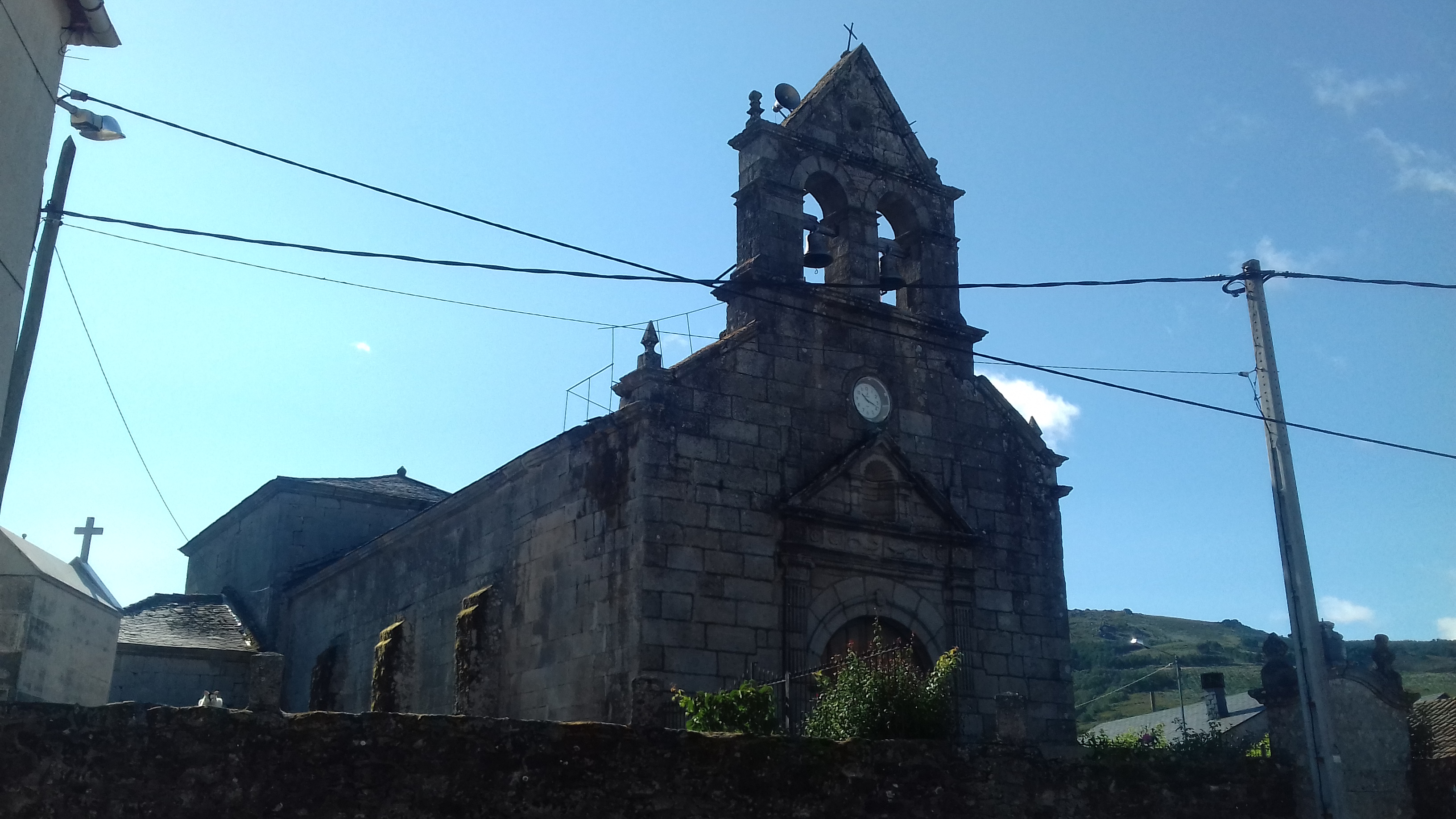 Igrexa parroquial de Santa María da Cabeza da Vilavella (A Mezquita)